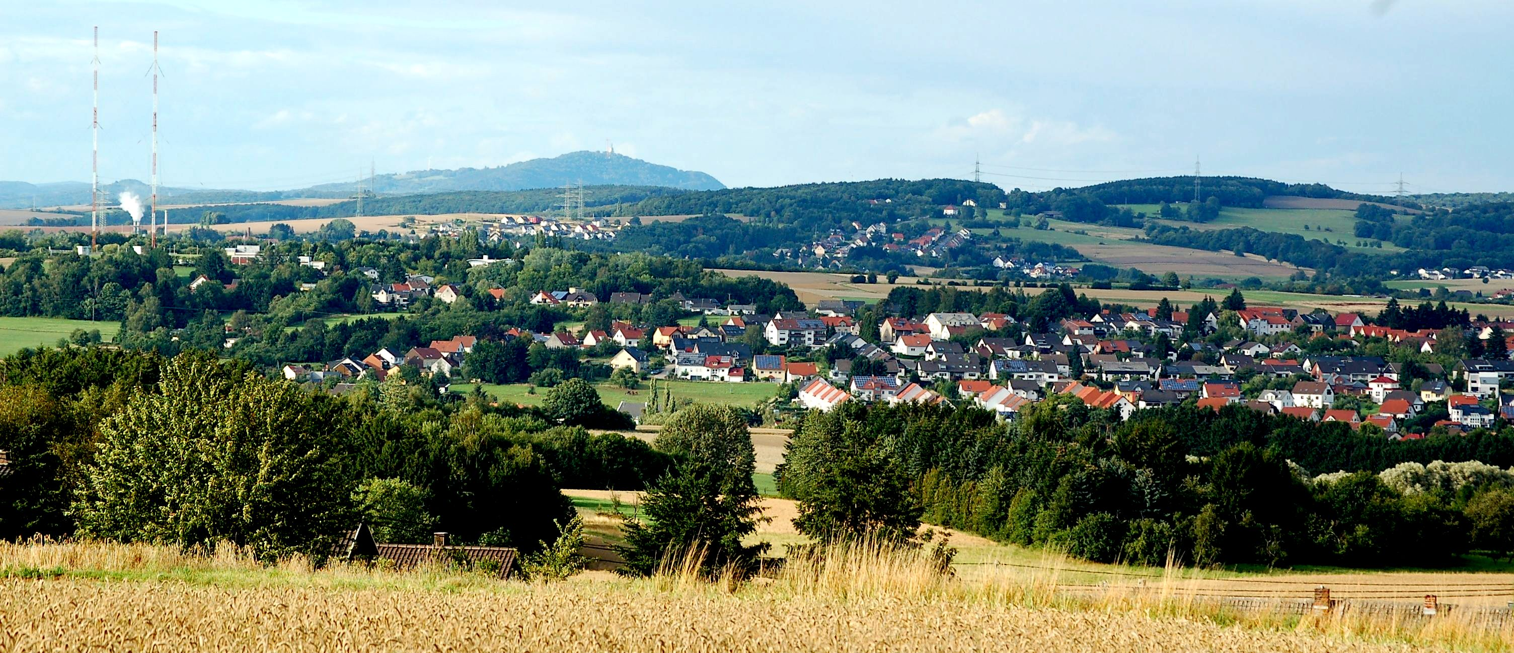 Blick von Herchenbach nach Norden über Heusweiler und Eiweiler zum Schaumberg. Davor die Höhenzüge des Großwaldes über Eiweiler, der nördliche Rand des Köllertals, wo der Köllerbach entspringt. Am linken Bildrand: der Mittelwellensender Heusweiler